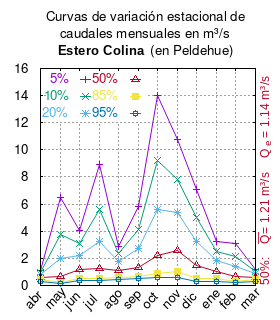 Curva de Variación Estacional del río Colina en Peldehue. # cita publicación #| apellido = Dirección General de Aguas #| nombre = #| enlace-autor = Ministerio de Obras Públicas (Chile) #| título = Diagnóstico y clasificación de los cursos y cuerpos de agua según objetivos de calidad. Cuenca del río Maipo #| ubicación = Santiago de Chile #| editorial = Ministerio de Obras Públicas (Chile) #| año = 2004 #| edición = #| url = #| urlarchivo = #| fechaarchivo = #| ref = harv # Tabla 4.13: Estación Colina en Peldehue pág. 65 mes 5% 10% 20% 50% 85% 95% abr 1.11 0.97 0.83 0.61 0.42 0.33 may 6.50 3.78 1.99 0.63 0.21 0.14 jun 4.08 3.11 2.23 1.19 0.55 0.35 jul 8.93 5.61 3.24 1.22 0.48 0.34 ago 2.91 2.35 1.80 1.09 0.59 0.41 sep 5.83 4.12 2.74 1.33 0.66 0.49 oct 14.04 9.21 5.58 2.23 0.86 0.56 nov 10.74 7.84 5.35 2.58 1.05 0.62 dic 7.10 4.99 3.26 1.45 0.53 0.30 ene 3.25 2.51 1.83 1.00 0.48 0.31 feb 3.10 2.14 1.38 0.64 0.30 0.21 mar 1.17 1.01 0.85 0.61 0.41 0.32 This plot was created with Gnuplot.